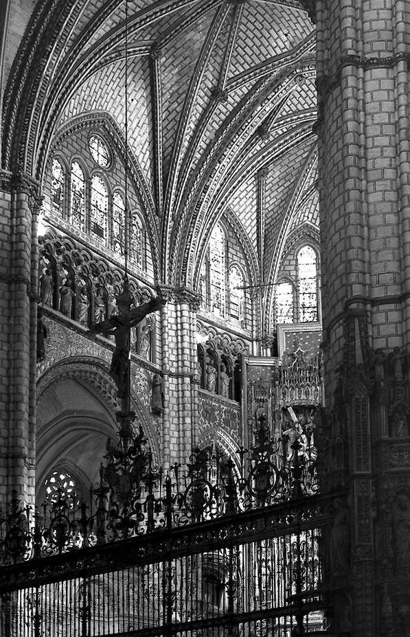 En primer término, rejería de la Capilla mayor de Toledo, España.